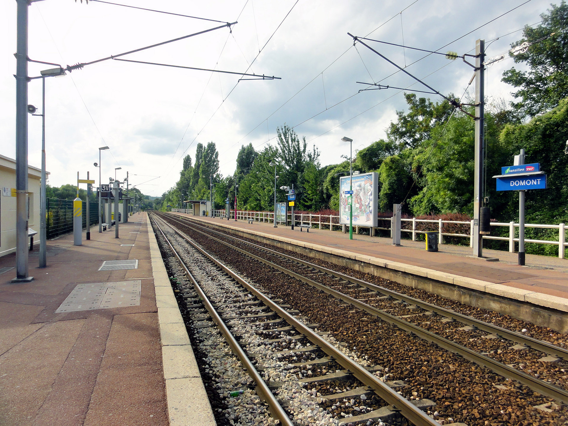 La gare de Domont, Val-d'Oise, France.